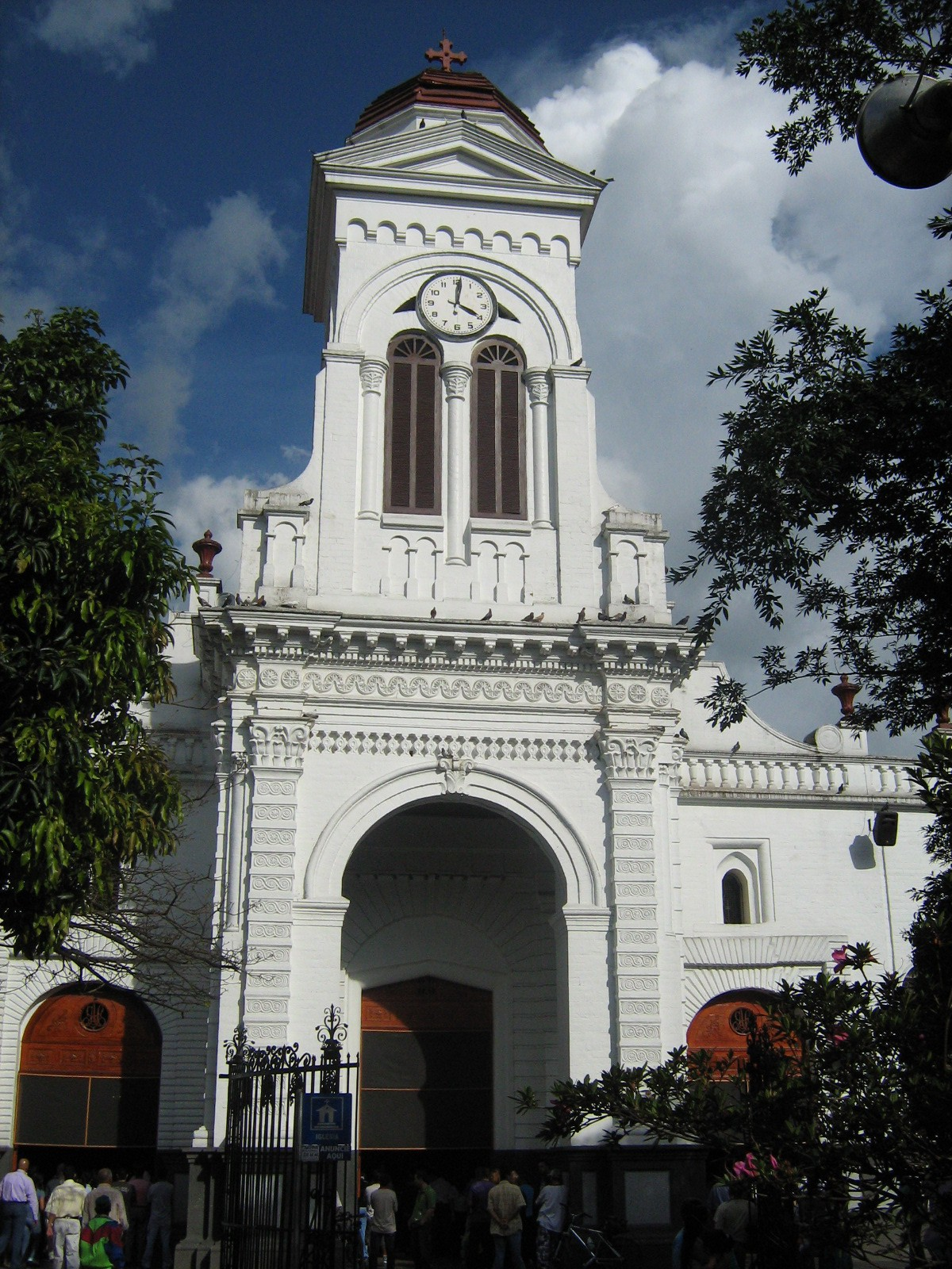 Iglesia de Santa Ana en el municipio de Sabaneta, Colombia